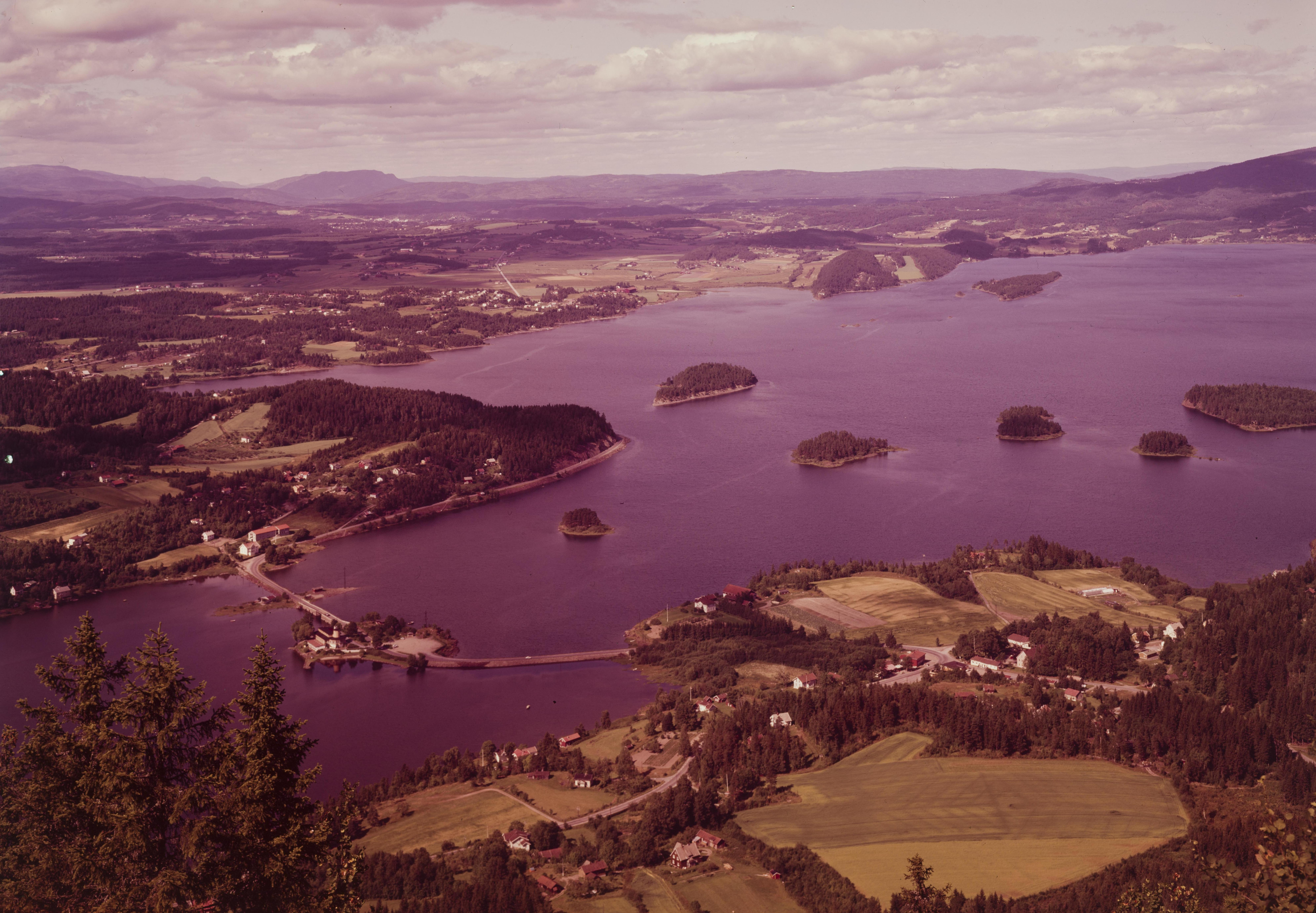 Bildet er hentet fra Nasjonalbibliotekets bildesamling. Anmerkninger til bildet var: Tittel er hentet fra emballasje. Steinsfjorden,Tyrifjorden, Hole, Buskerud